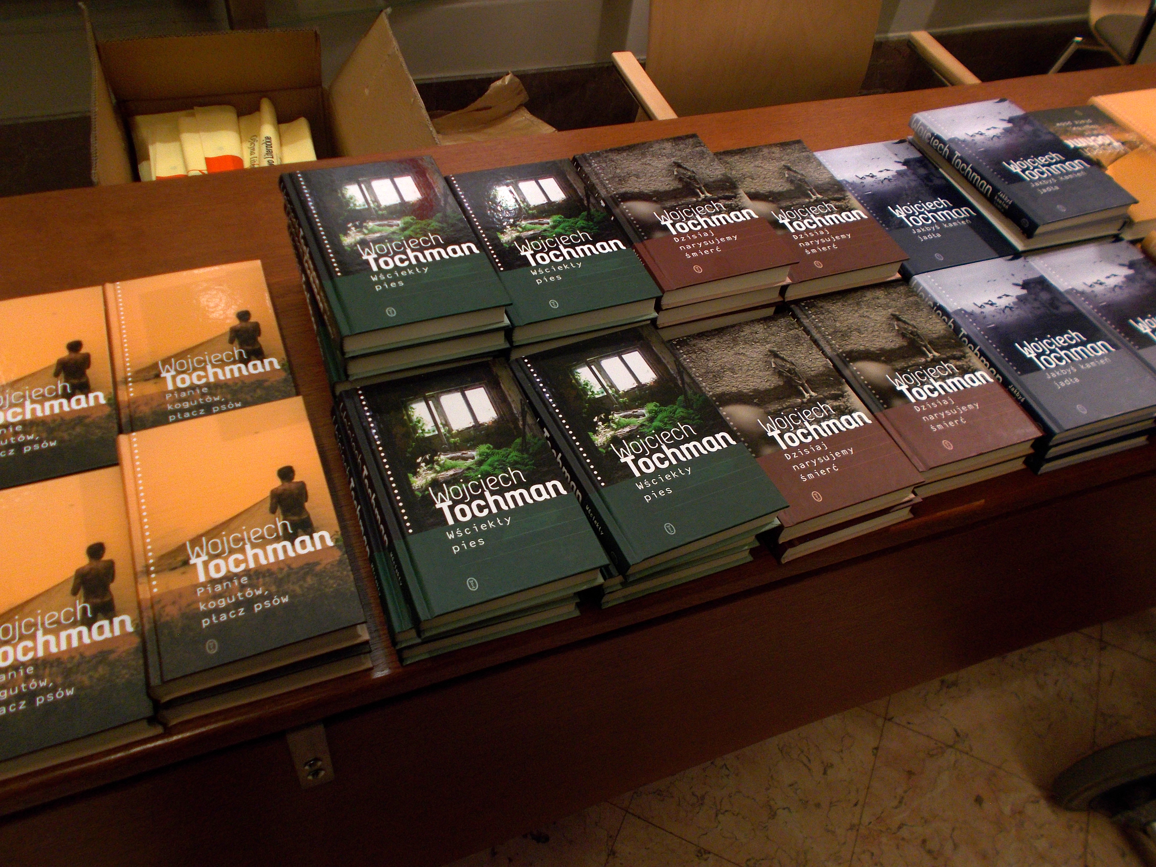 Publikacje Wojciecha Tochmana na stoisku podczas spotkania z czytelnikami w Krakowie, w Międzynarodowym Centrum Kultury, po wydaniu książki „Pianie kogutów, płacz psów”